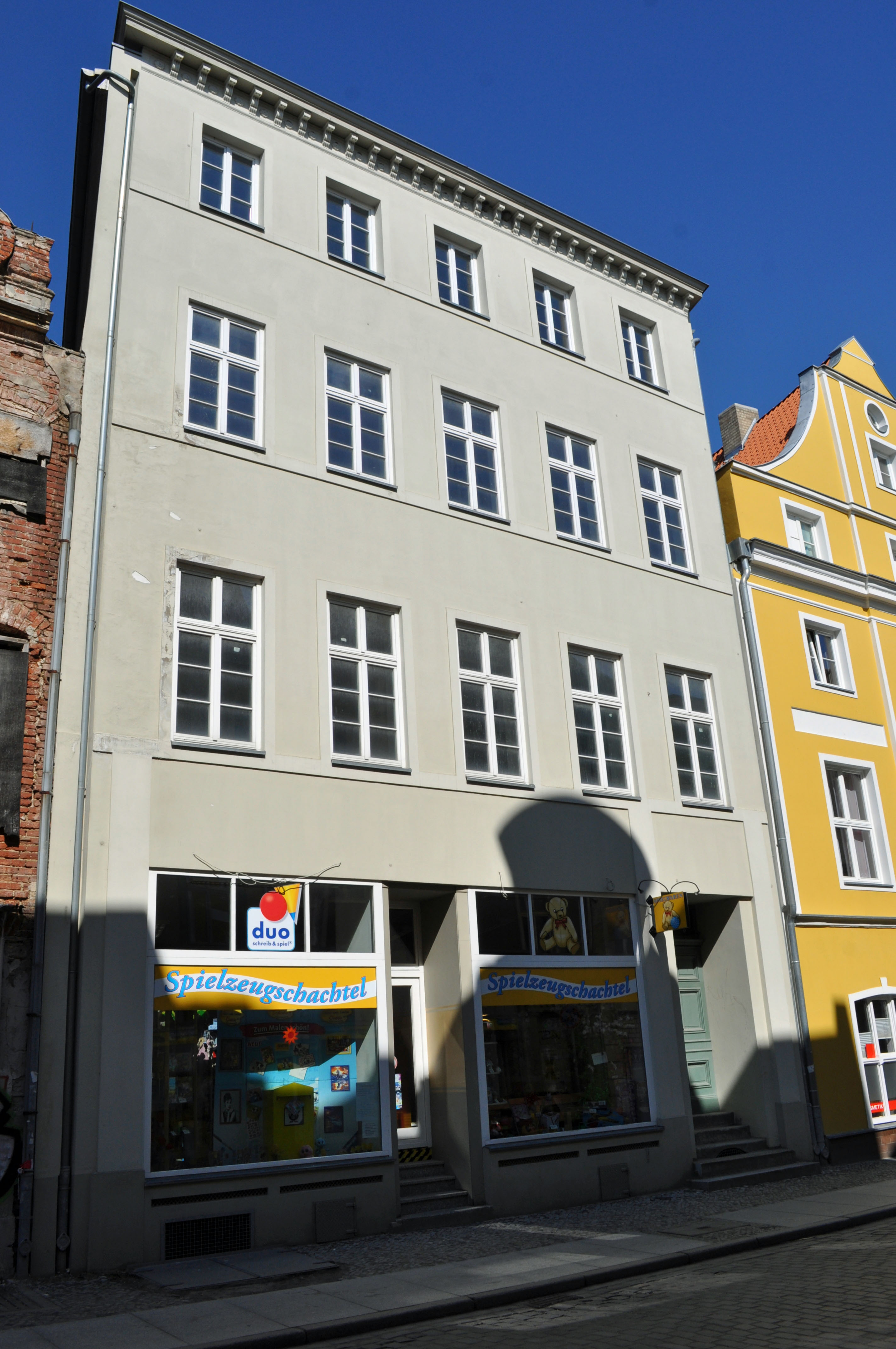 Gebäude bzw. Gebäudedetail in Stralsund. Straße und Hausnummer siehe Dateiname.